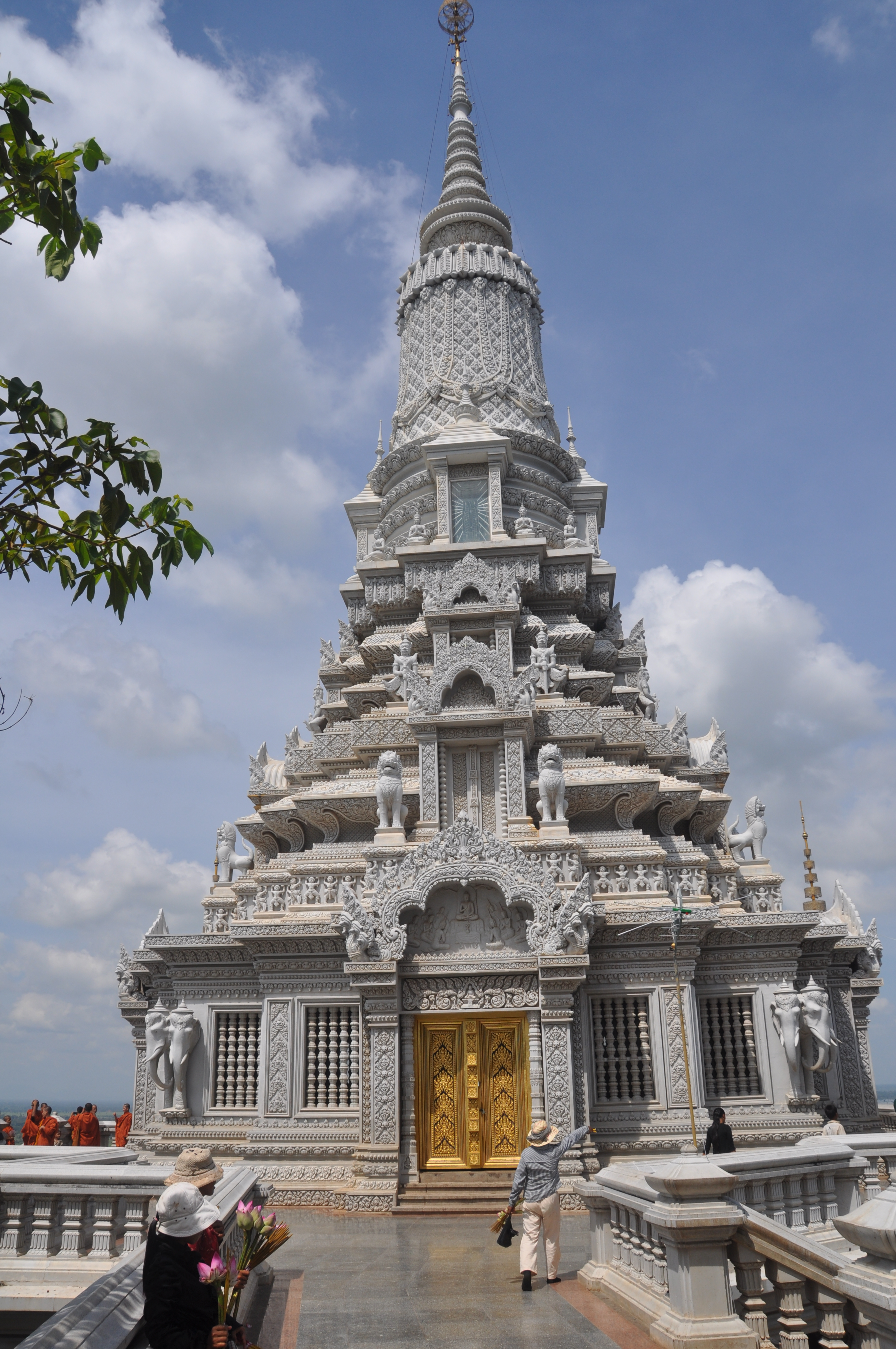 Sanchak Mony Chedei, Oudung, Cambodia